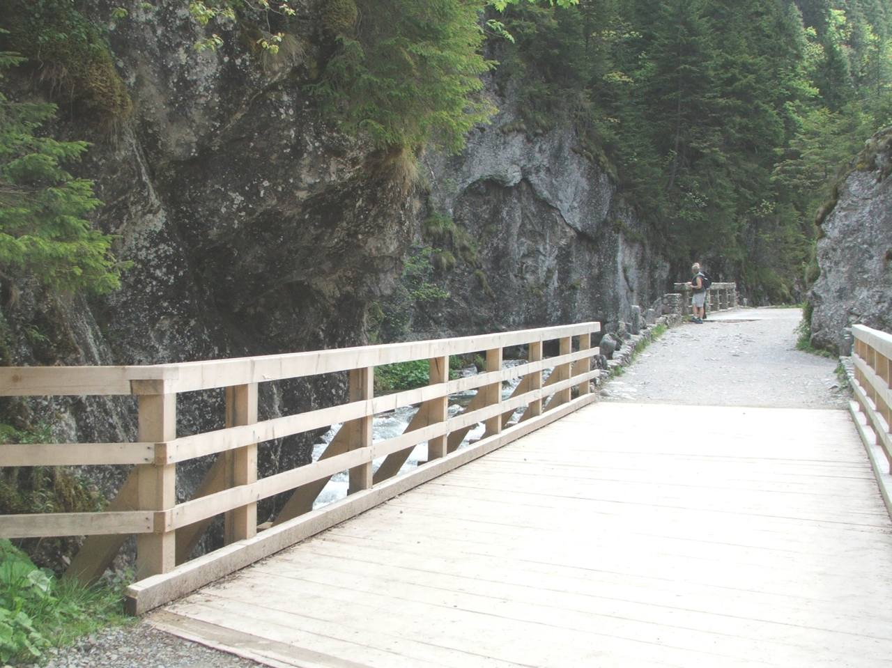 Skała Pisana(Dolina Kościeliska)